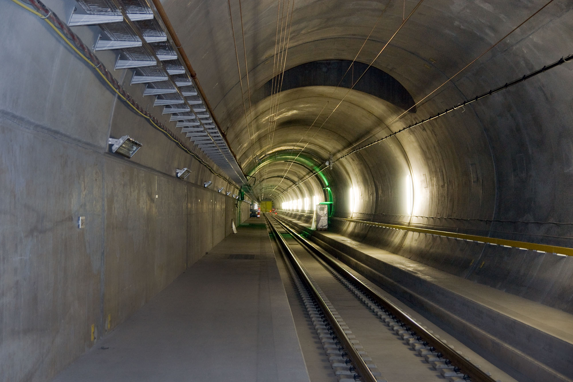 Nothaltestelle Faido in der Oströhre des Gotthard-Basistunnels, Belüftungsschacht in der Tunneldecke